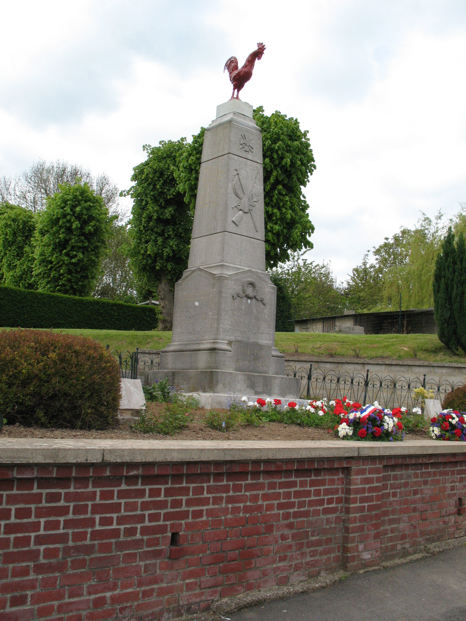 Monument érigé à la mémoire des militaires de Querrieu morts pour la France en 1914-1918.